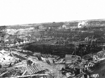 Строительство канала Москва-Волга Building of Moscow-Volga canal